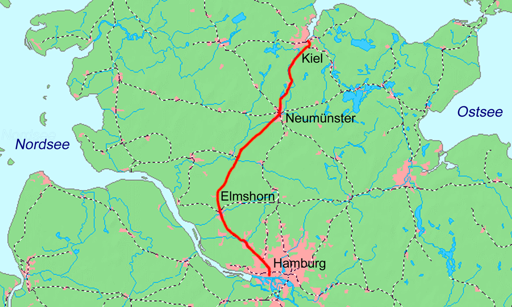 Karte Altona-Kieler Eisenbahn